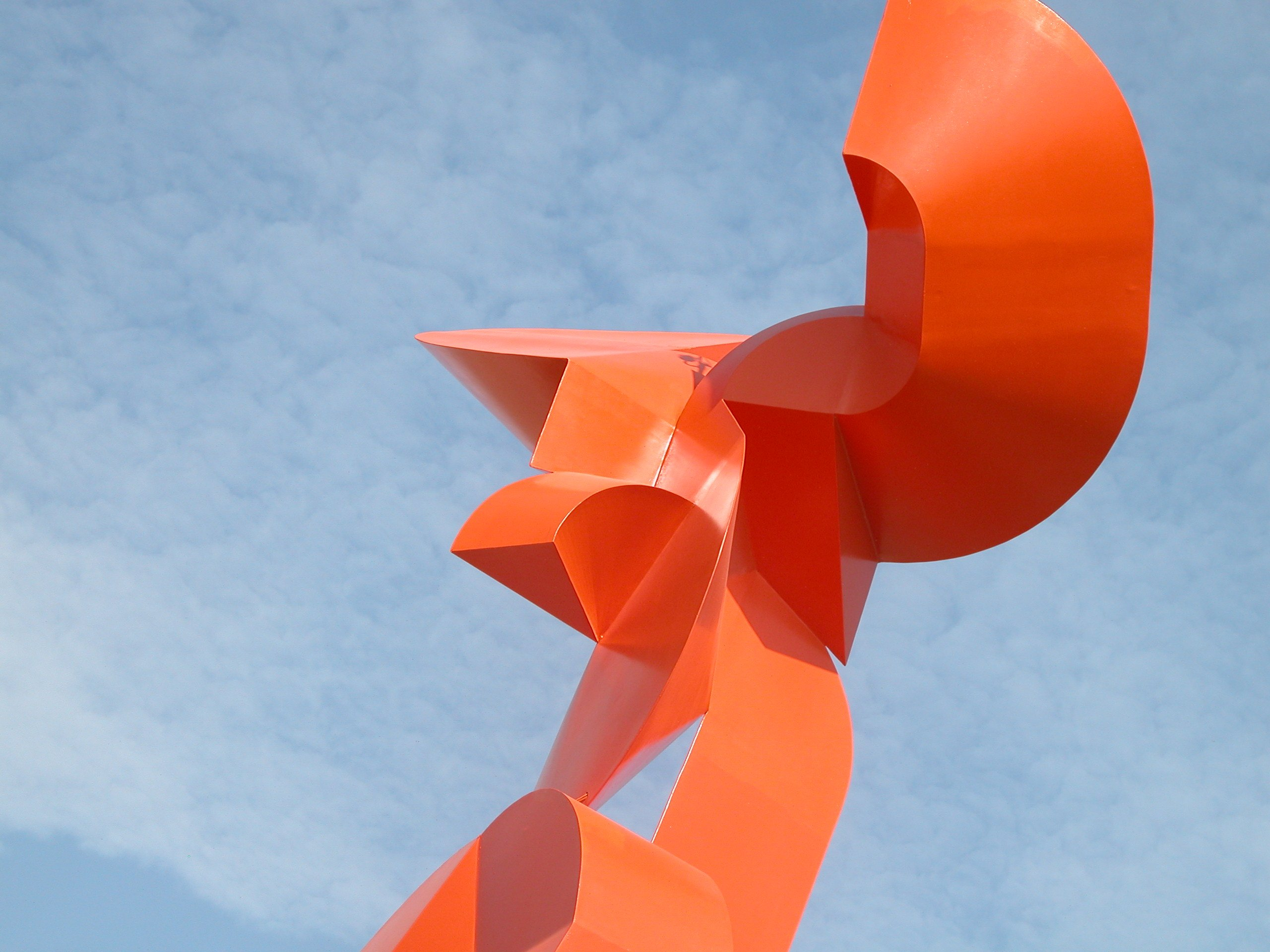 El Vuelo de Halcón, escultura monumental de Sebastián ubicada en el campus de la Universidad Autónoma de La Laguna en Torreón Coahuila.